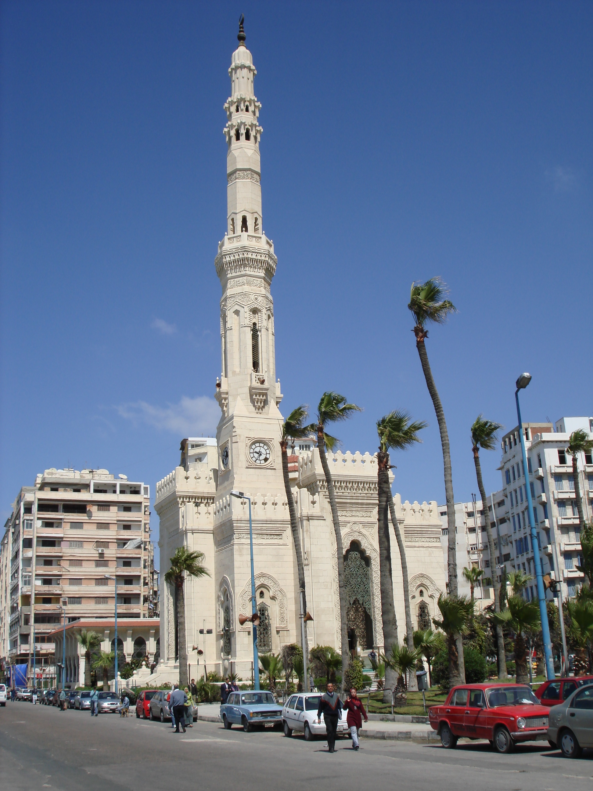 Al Qa'ed Ibrahim Mosque - Alexandria - Egypt